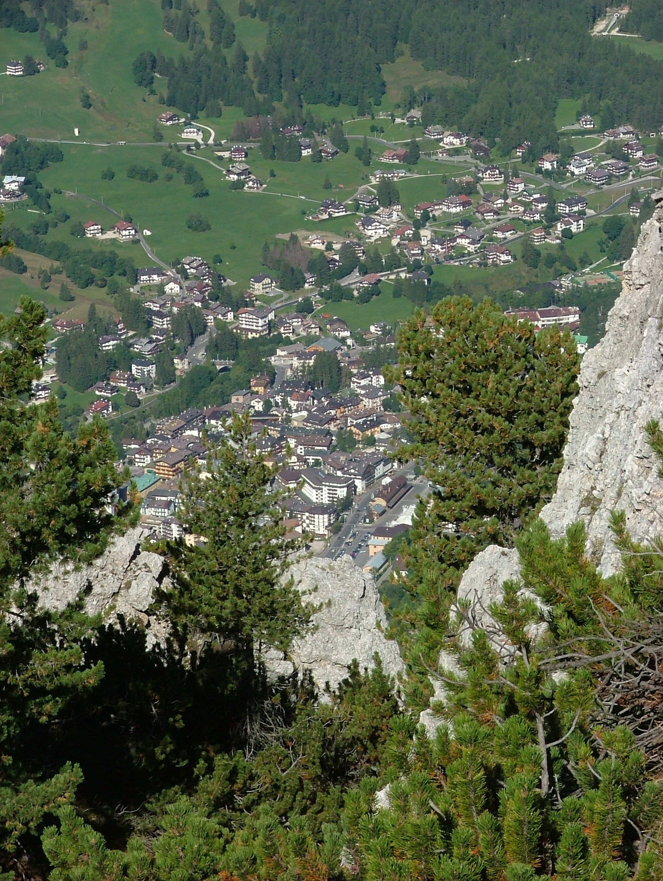 Vista di Cortina dal Monte Faloria